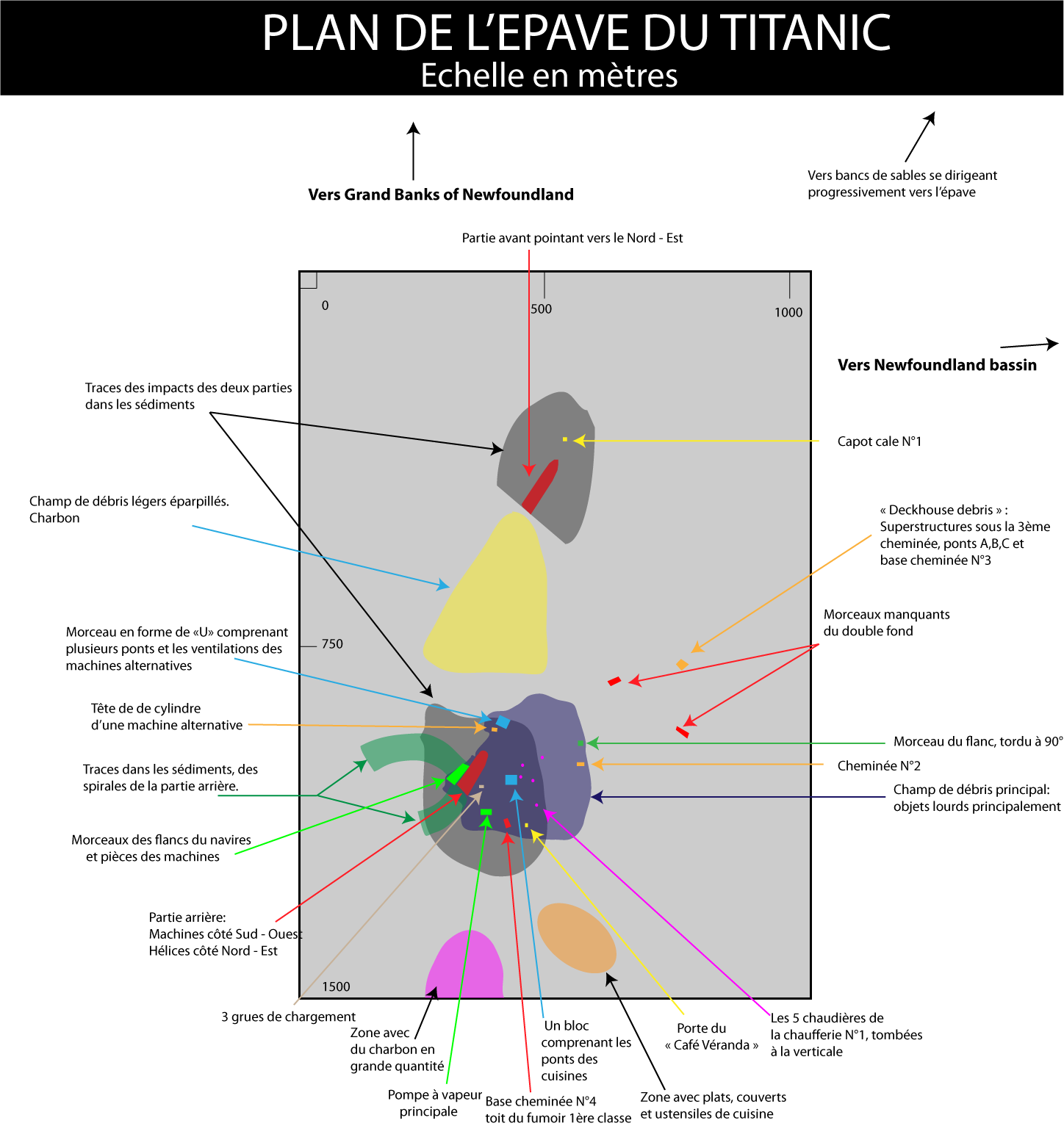 MAJ de la carte du site de l'épave du Titanic